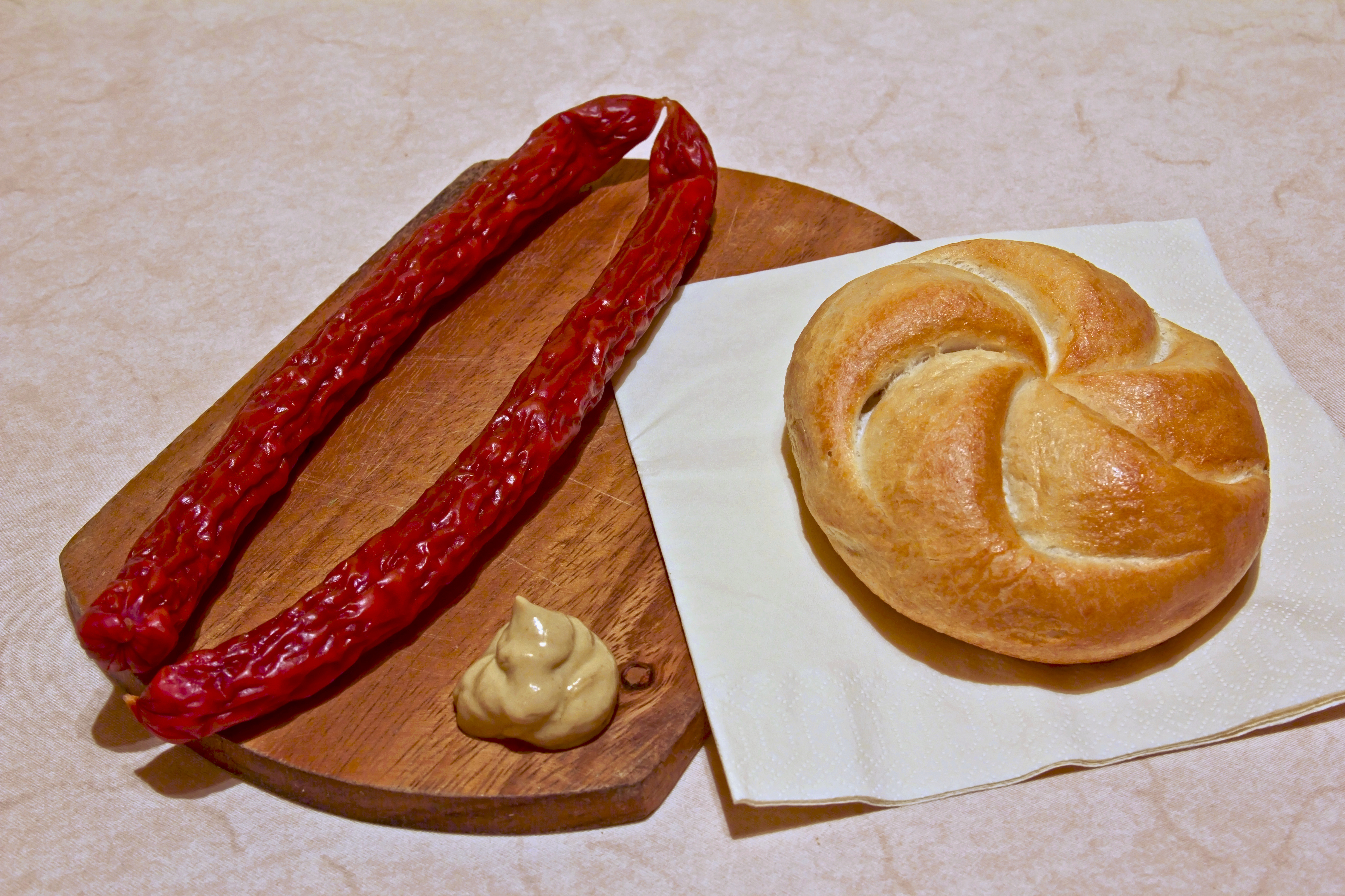 Cabanossi (Rohwurst) Serviervorschlag